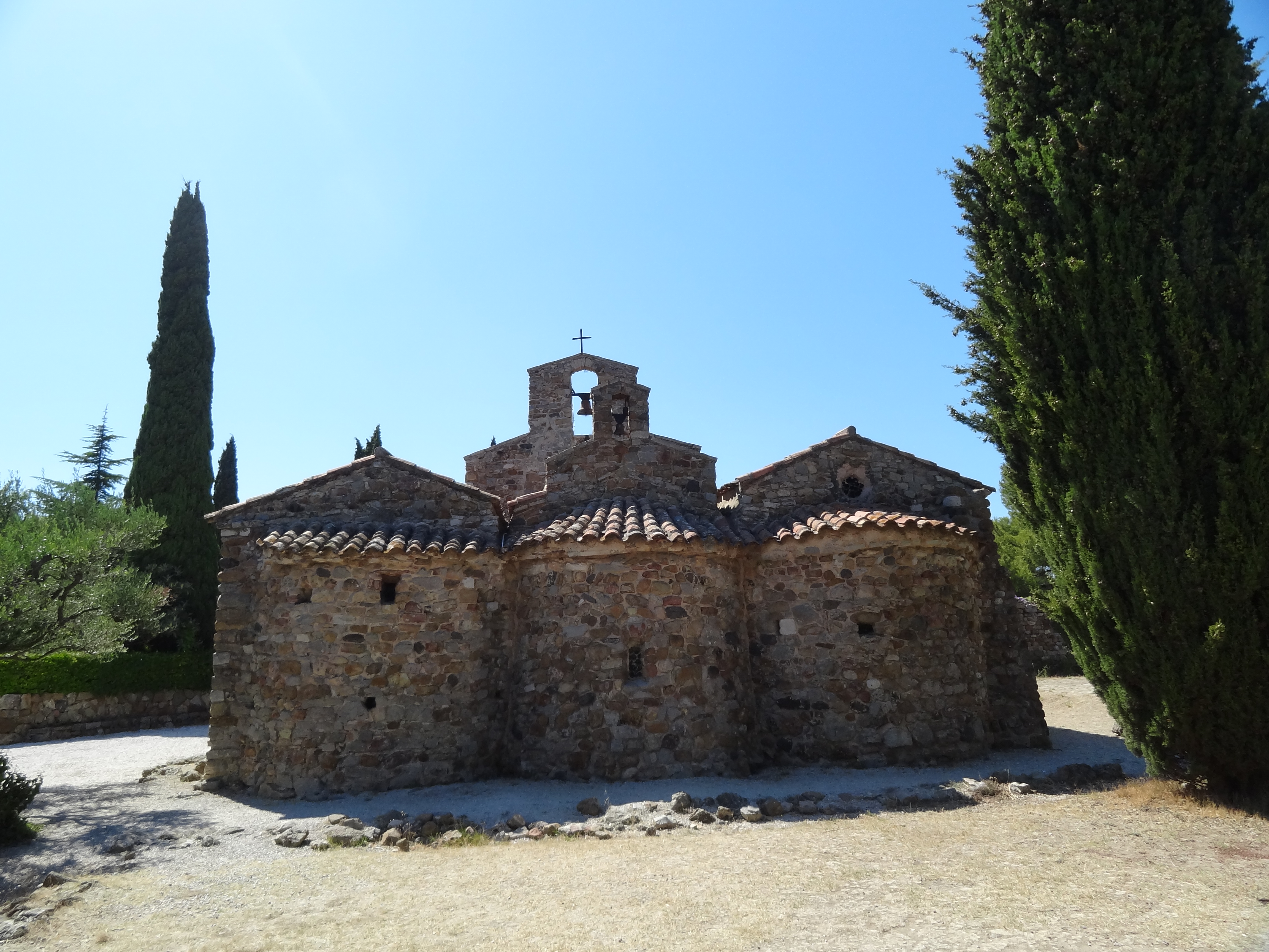 Vue des trois nefs de la Chapelle de Pepiole, Les Playes commune de Six-Fous-les-plages